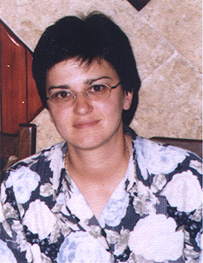 Даниела Дженева